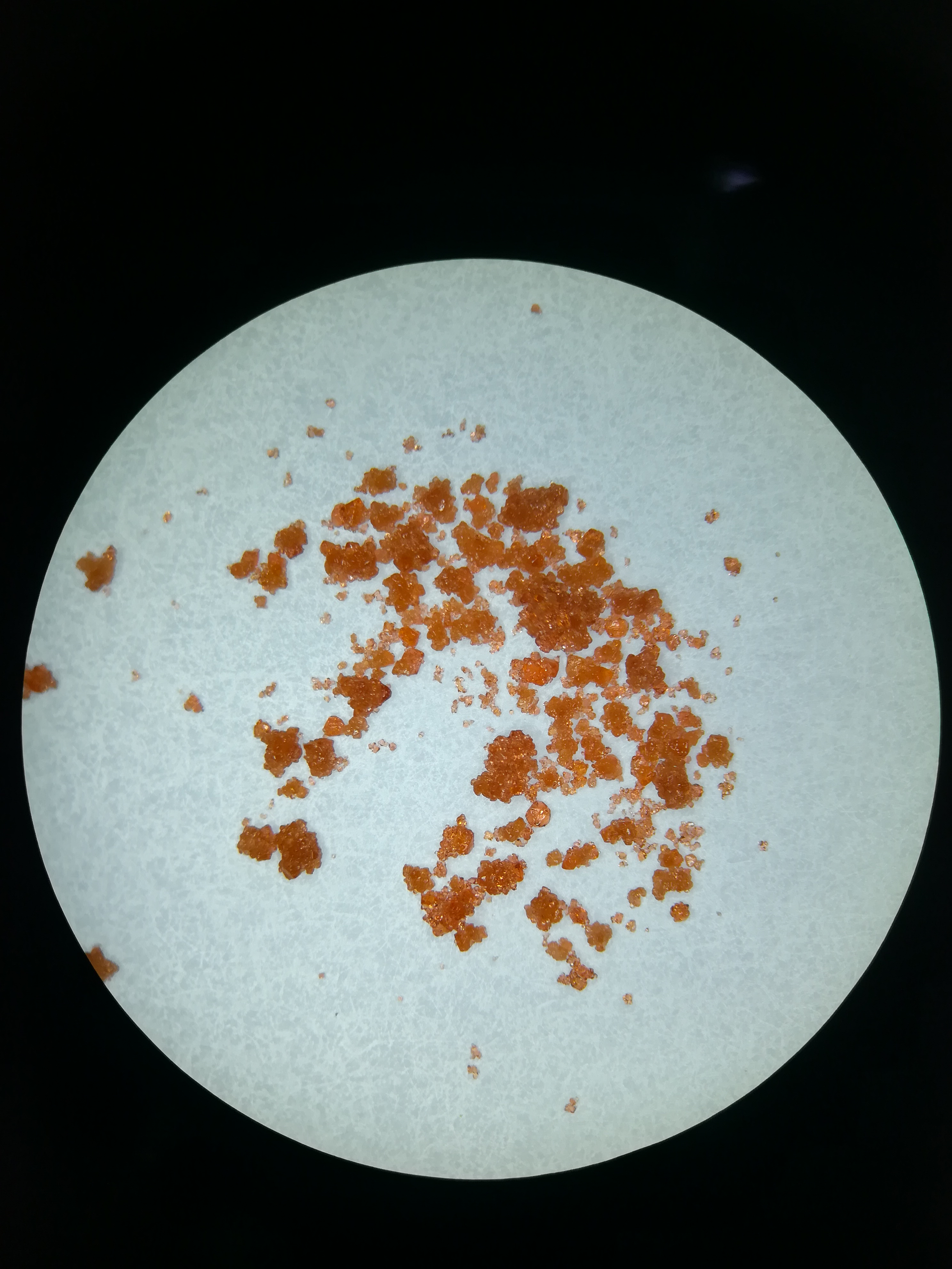 中文（中国大陆）: 显微镜下的硫酸钴(七水)